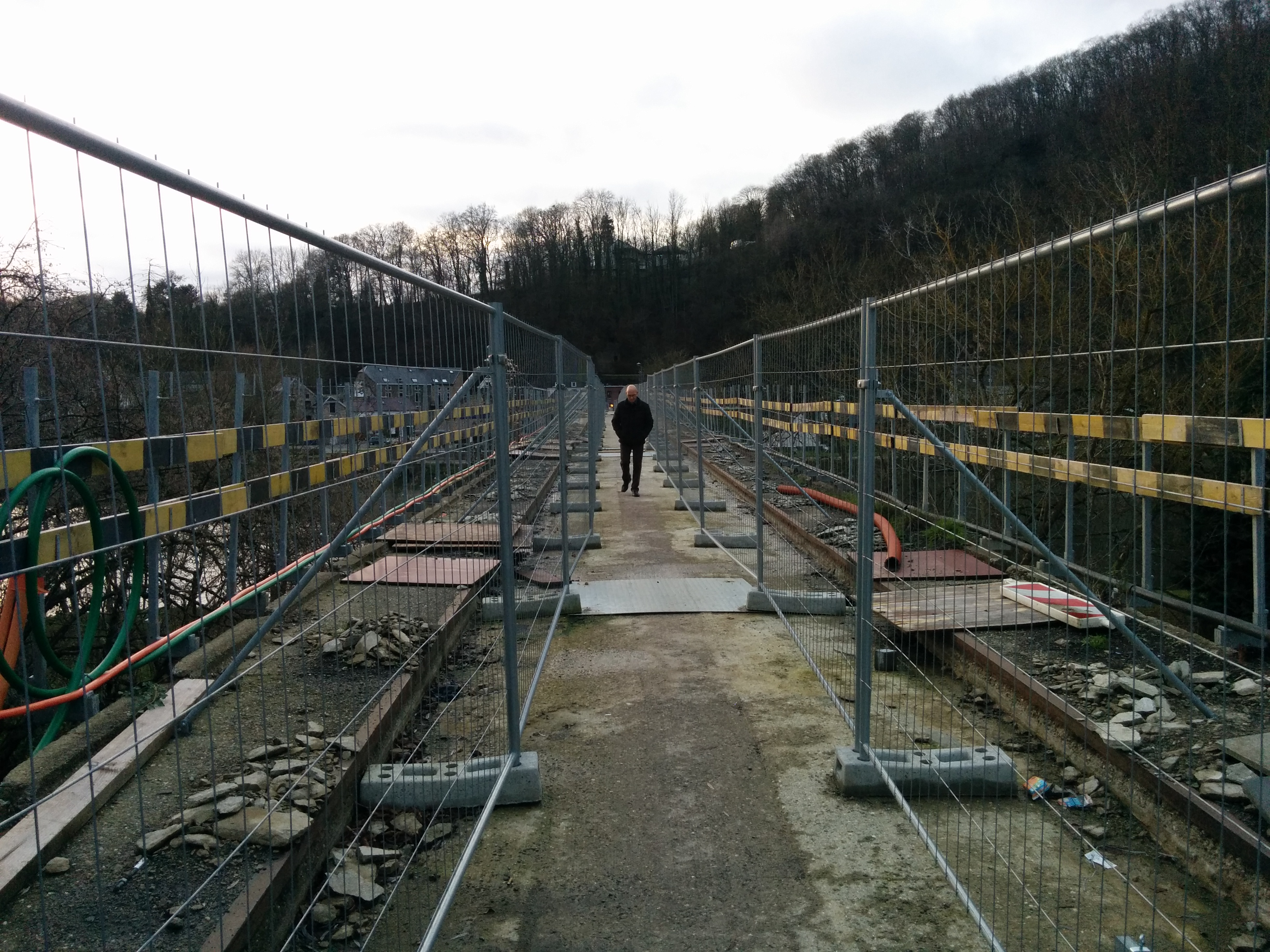 Piéton traversant le pont de Godinne, fermé à la circulation. This photo of immovable heritage has been taken in the Walloon Region